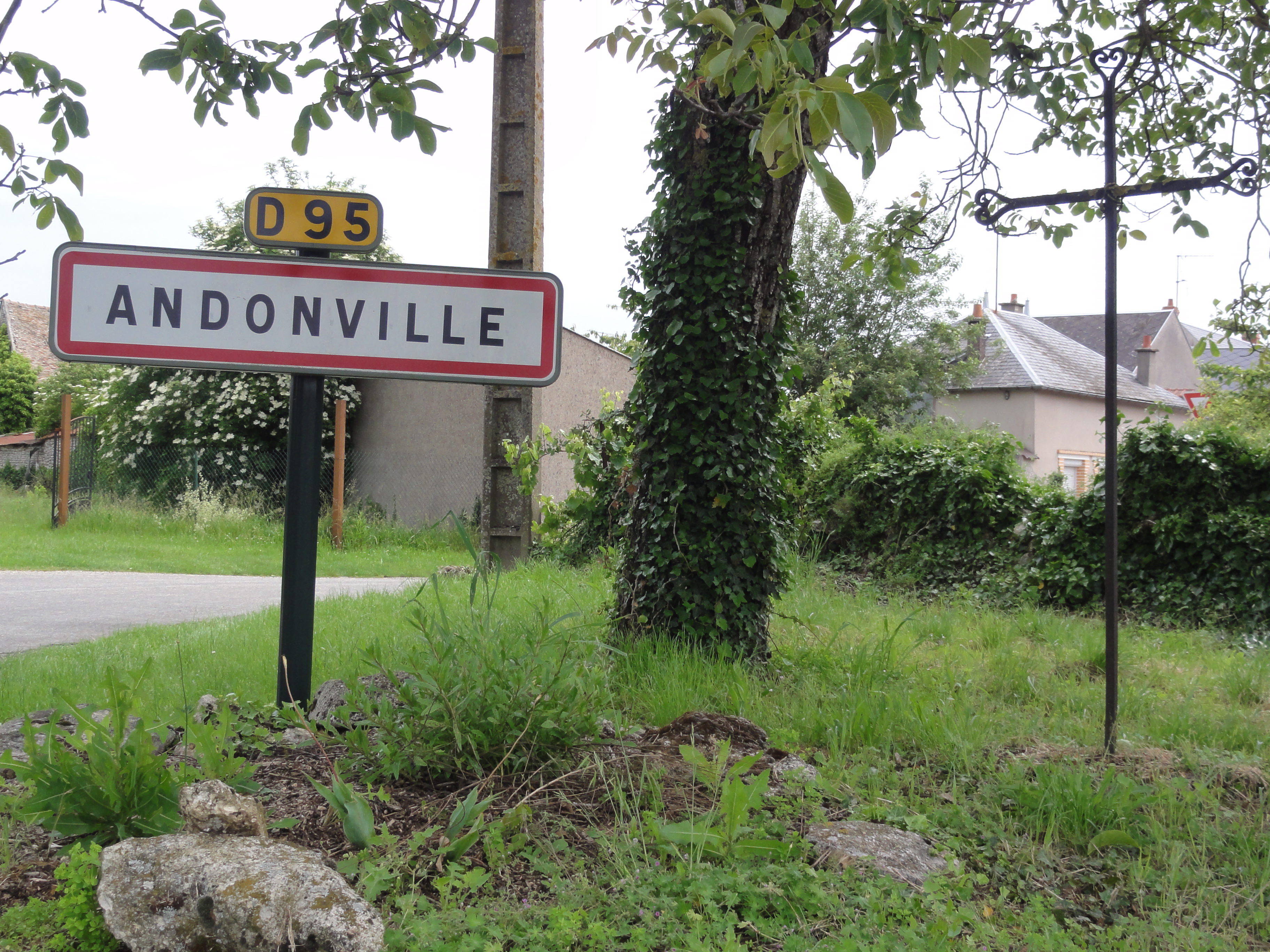 Andonville (Loiret) panneau et croix de chemin